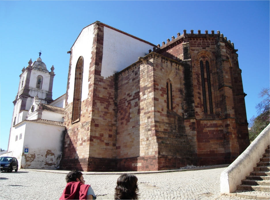 Sé de Silves